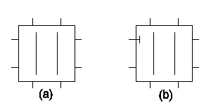 Autore: Ede Licenza: pubblico dominio Descrizione: Rappresentazione simbolica dell'adattatore parallelo di un filtro digitale ad onda. (a) Senza porta priva di riflessione (b) Con porta priva di riflessione